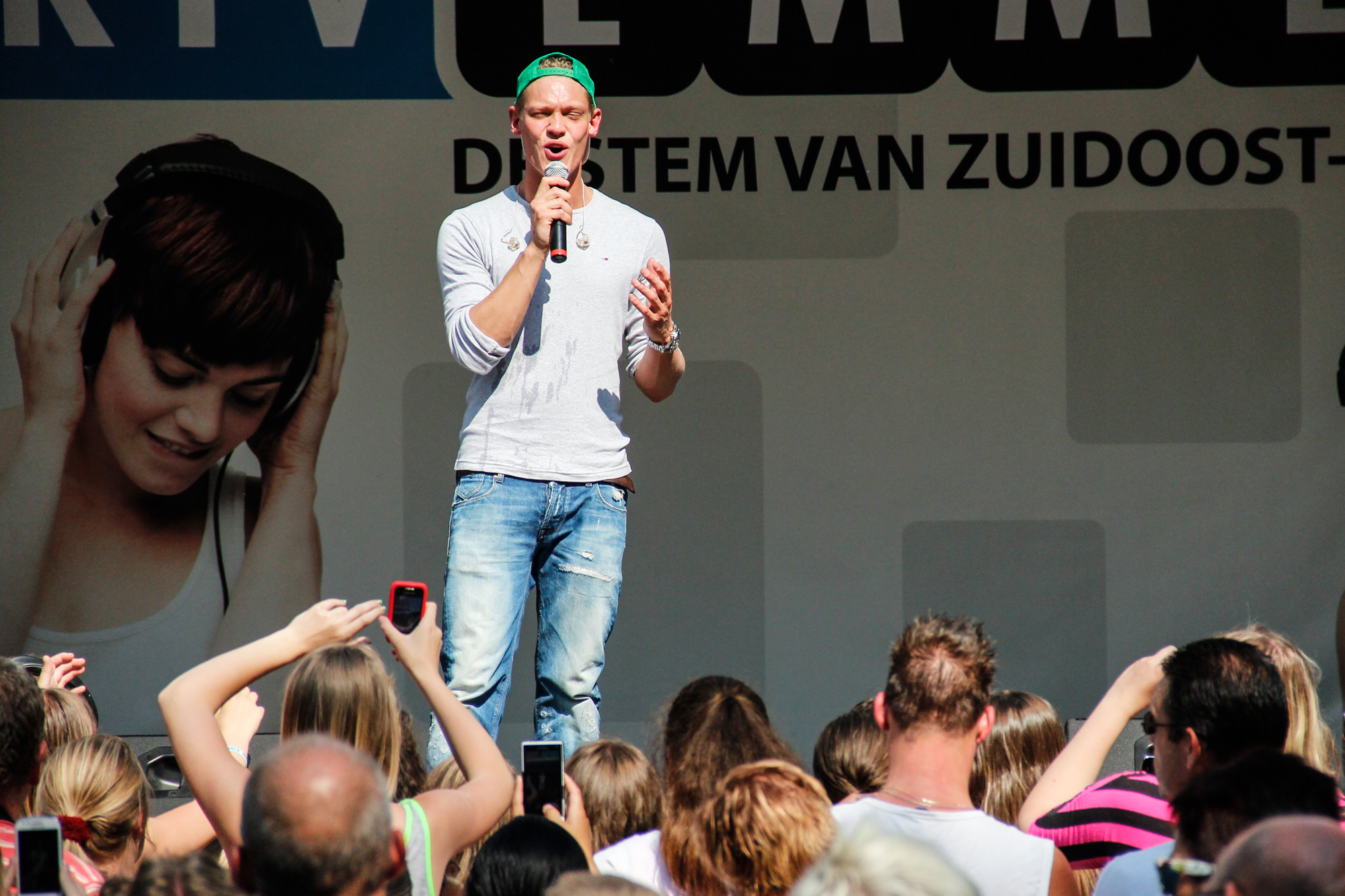 Ferry Doedens tijdens een optreden bij Alles Kids in Drenthe 2013